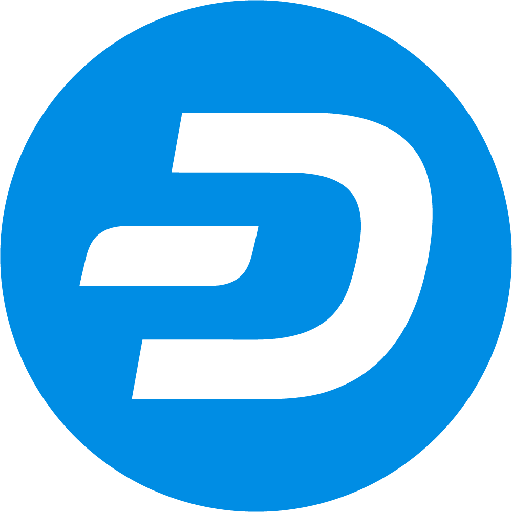 Questa guida di stile del brand contiene tutto il necessario per creare un punto di contatto Dash completamente riconoscibile. Offre inoltre ai nostri stimati partner le informazioni necessarie per commercializzare chiaramente e con successo il loro marchio in collaborazione con il nostro.